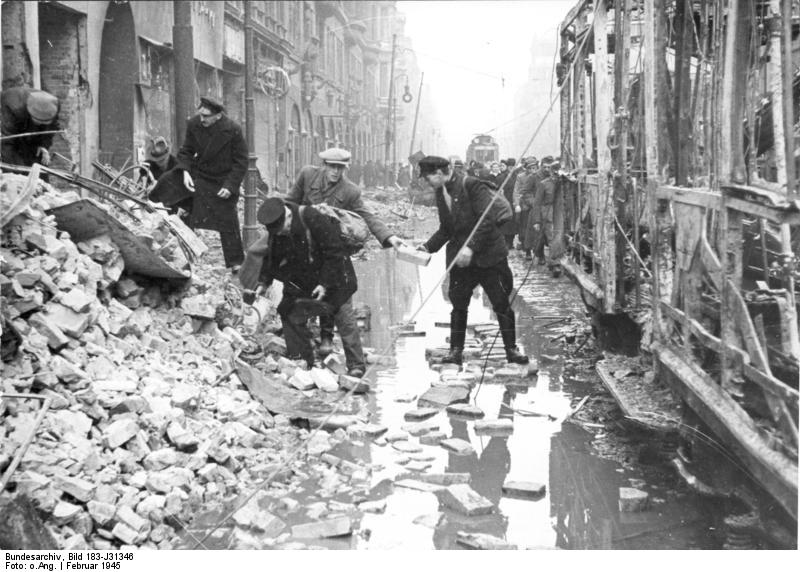 Berlin, Zerstörungen in der Oranienstraße Scherl: ADN-ZB/Archiv II. Weltkrieg 1939-45 Berlin nach dem Luftangriff am 3.2.1945. Ein Wasserrohr barst beim Angriff. Die Wassermassen überschwemmten die Oranienstraße. Passanten bauen aus Trümmersteinen neben einer zerstörten Straßenbahn einen Notsteg.